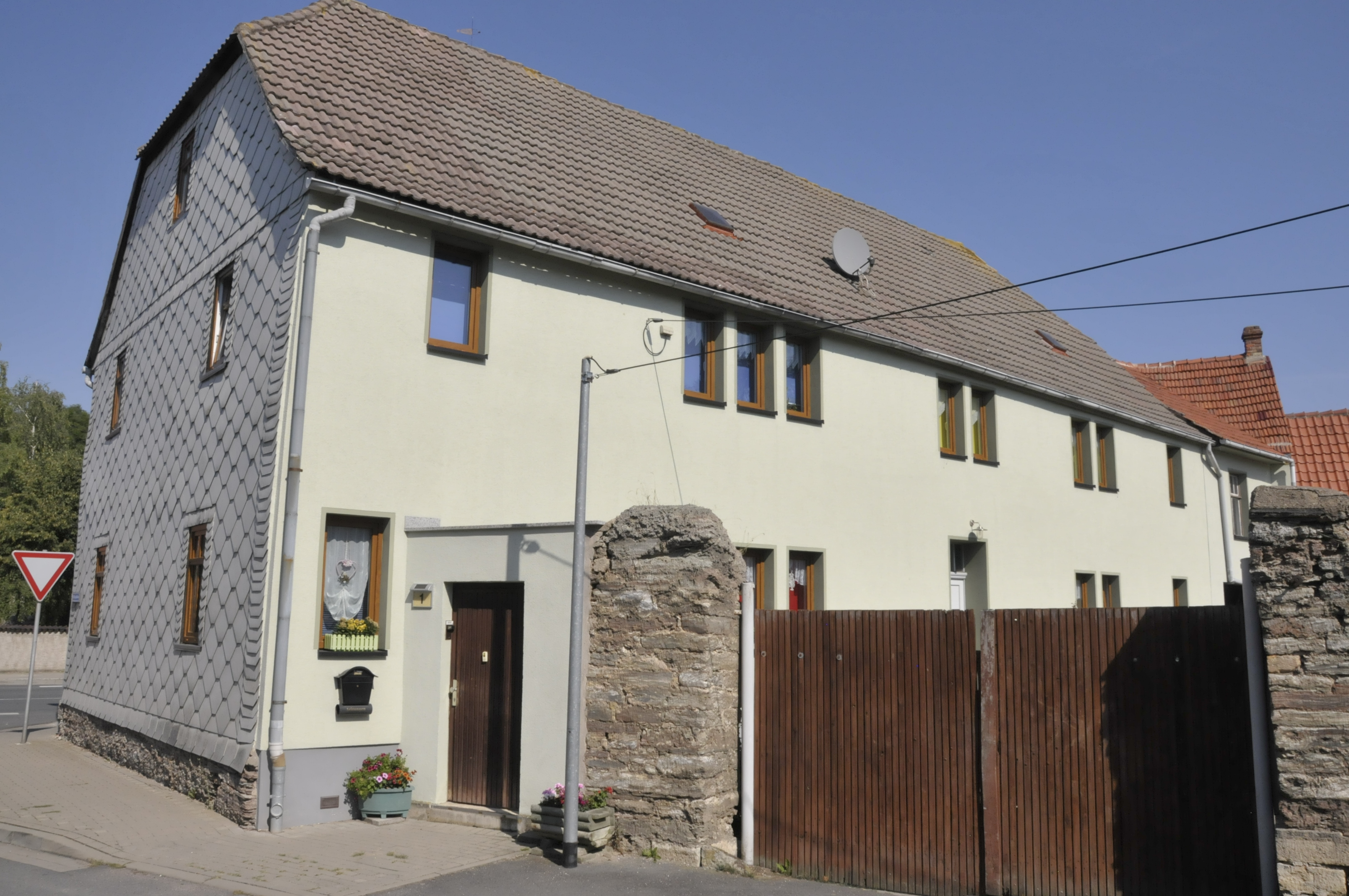 Tunzenhausen, Platz der Märzgefallenen 1, ehem. Pfarrhaus